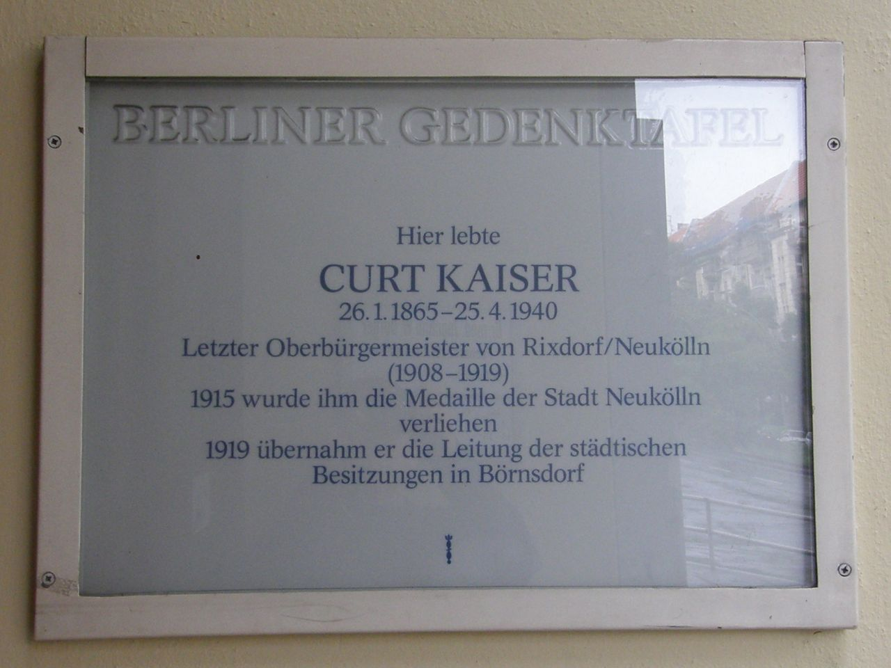 Berliner Gedenktafelfür Curt Kaiser. Sonnenallee 124, Berlin-Neukölln. Enthüllt am 25. April 1990